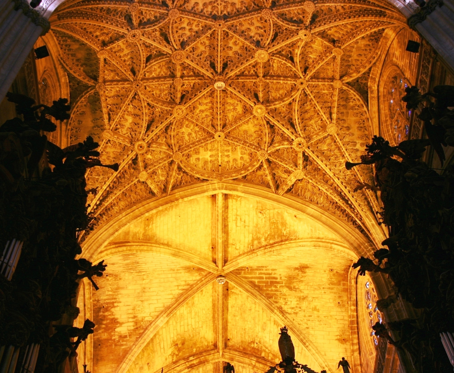 Teto sobre o coro.